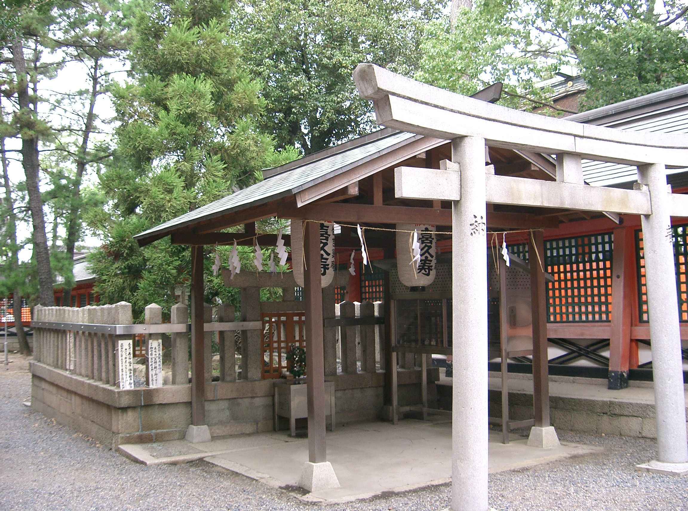 住吉大社